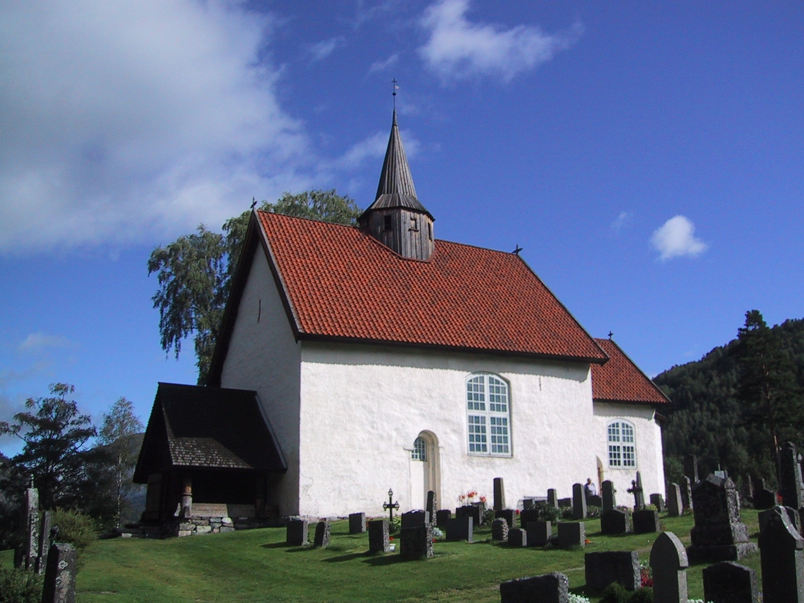 Norsk (nynorsk): Seljord kyrkje frå sørvest